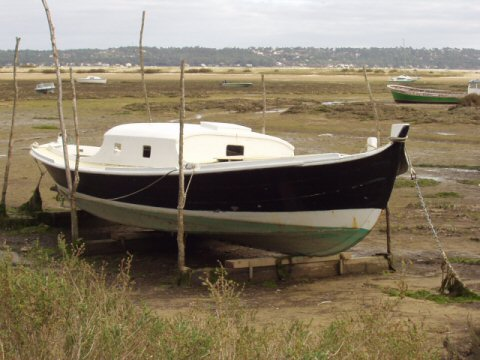 Pinasse d'Andernos les Bains - Bassin D'arcachon, France, 2003